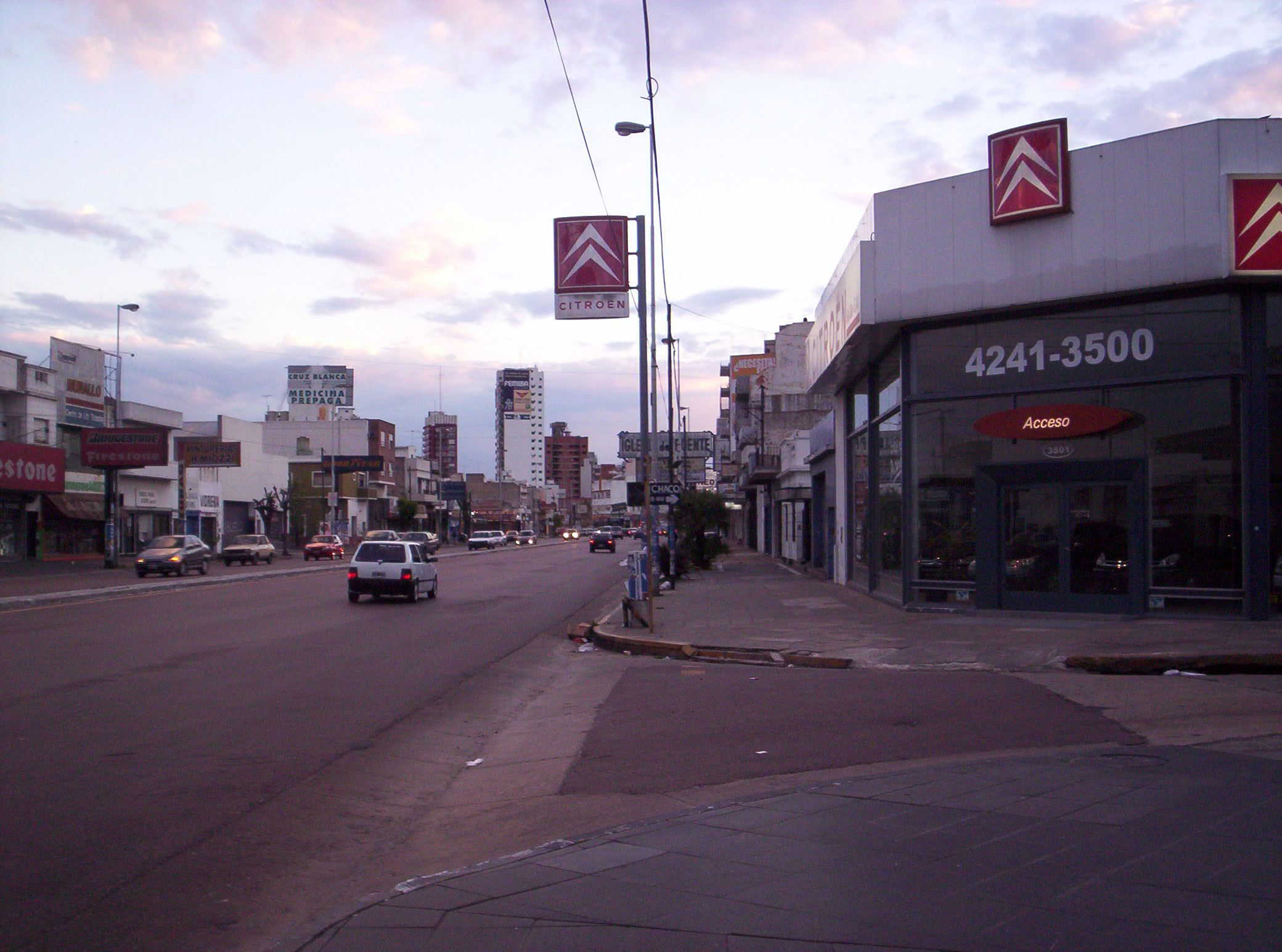 Avenida Hipólito Irigoyen al 3500, en su intersección con la calle Chaco, Partido de Lanús